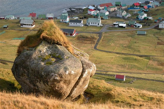 Big stone and Sandvík